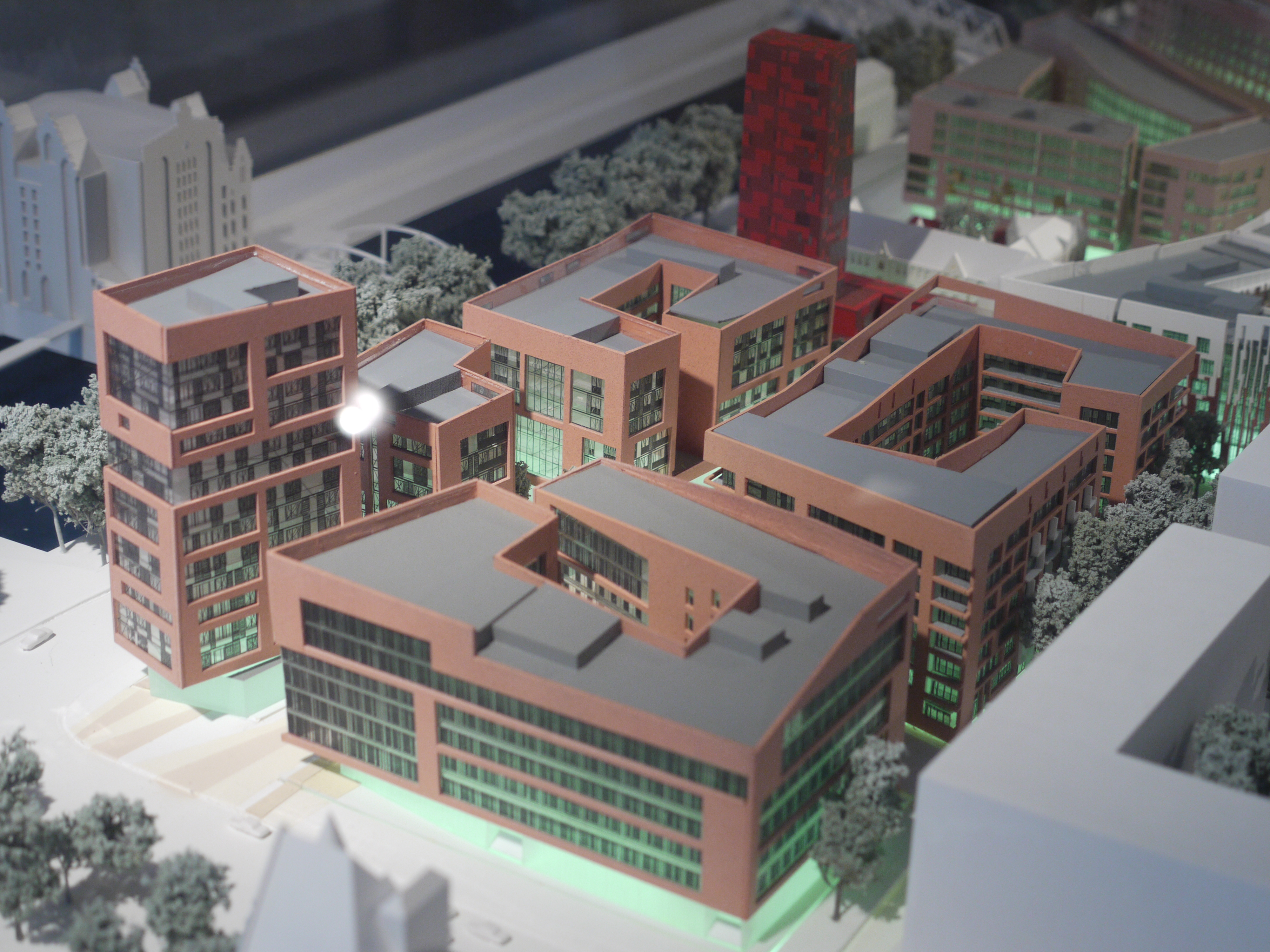 Modell des Gebäudeensembles Am Kaffeelager in der HafenCity in Hamburg.